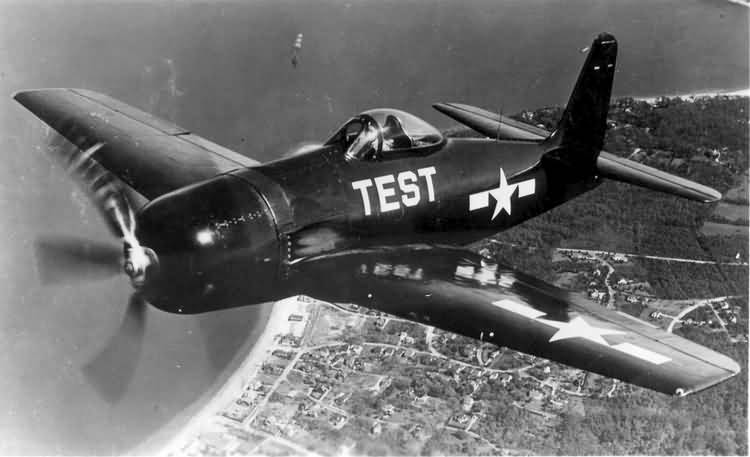 Bearcat aus der englischen Wiki, aus der engl. WP. dort PD US